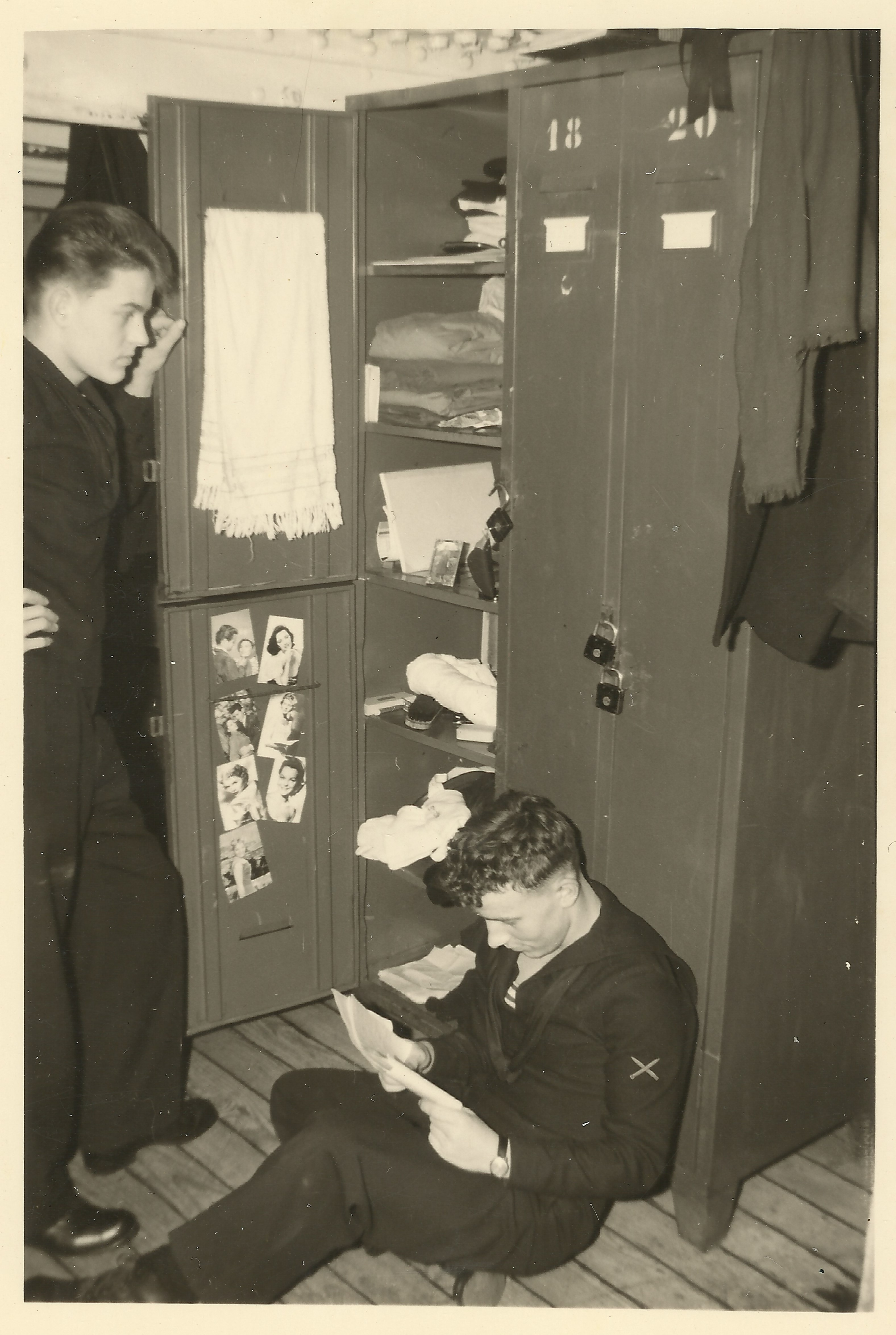 Du mararmeanoj en hamakoj sur Zr Ms Buffel en Amsterdamo